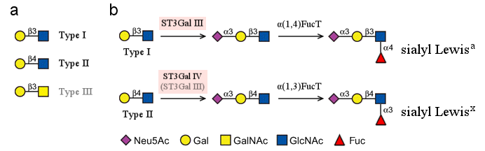 Síntesi de Sialil-Lewis